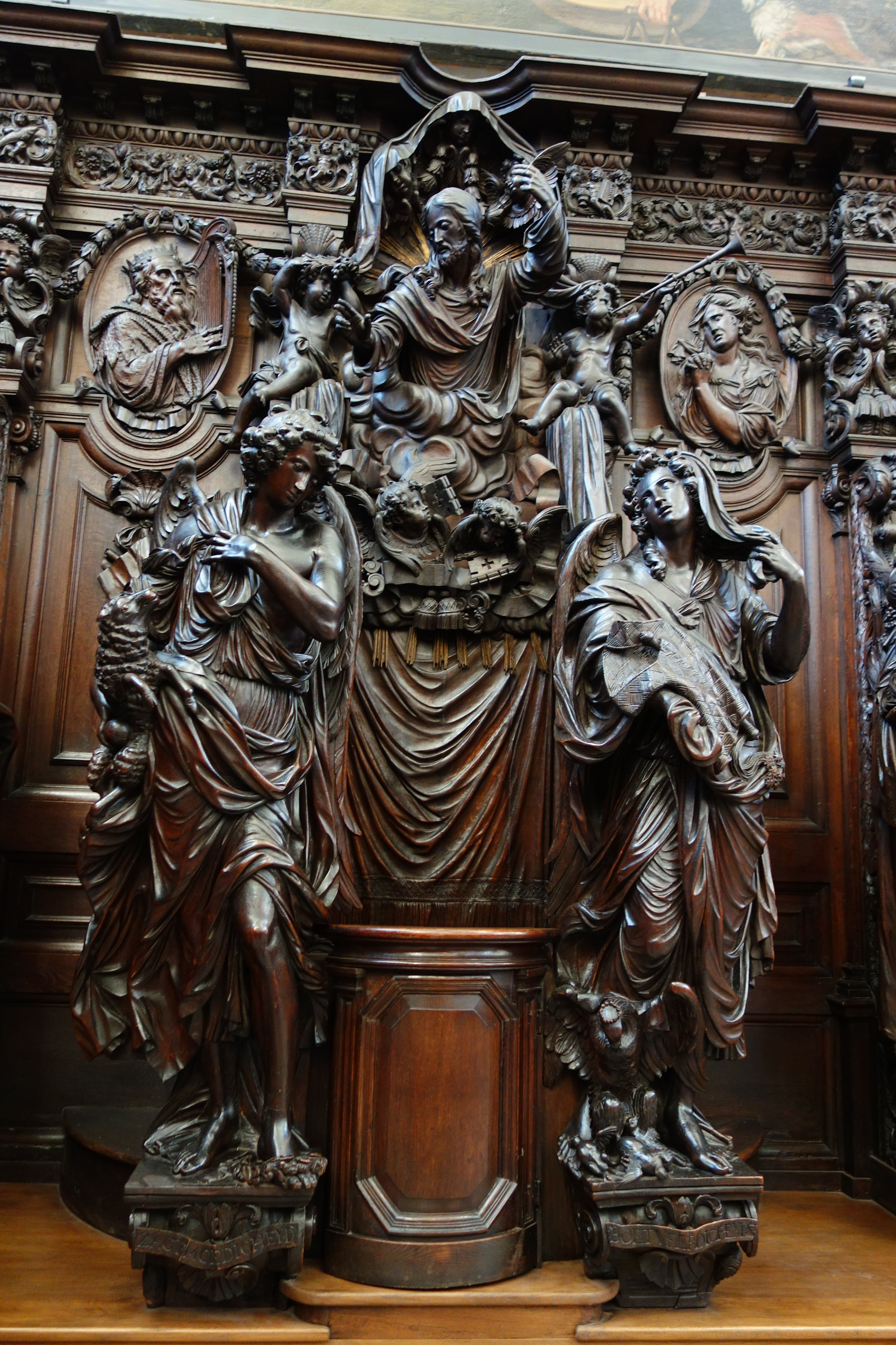 Het Laatste Oordeel van Willem Kerricx. Christus tussen Zactmoedicheyd en Boetveerdicheyd